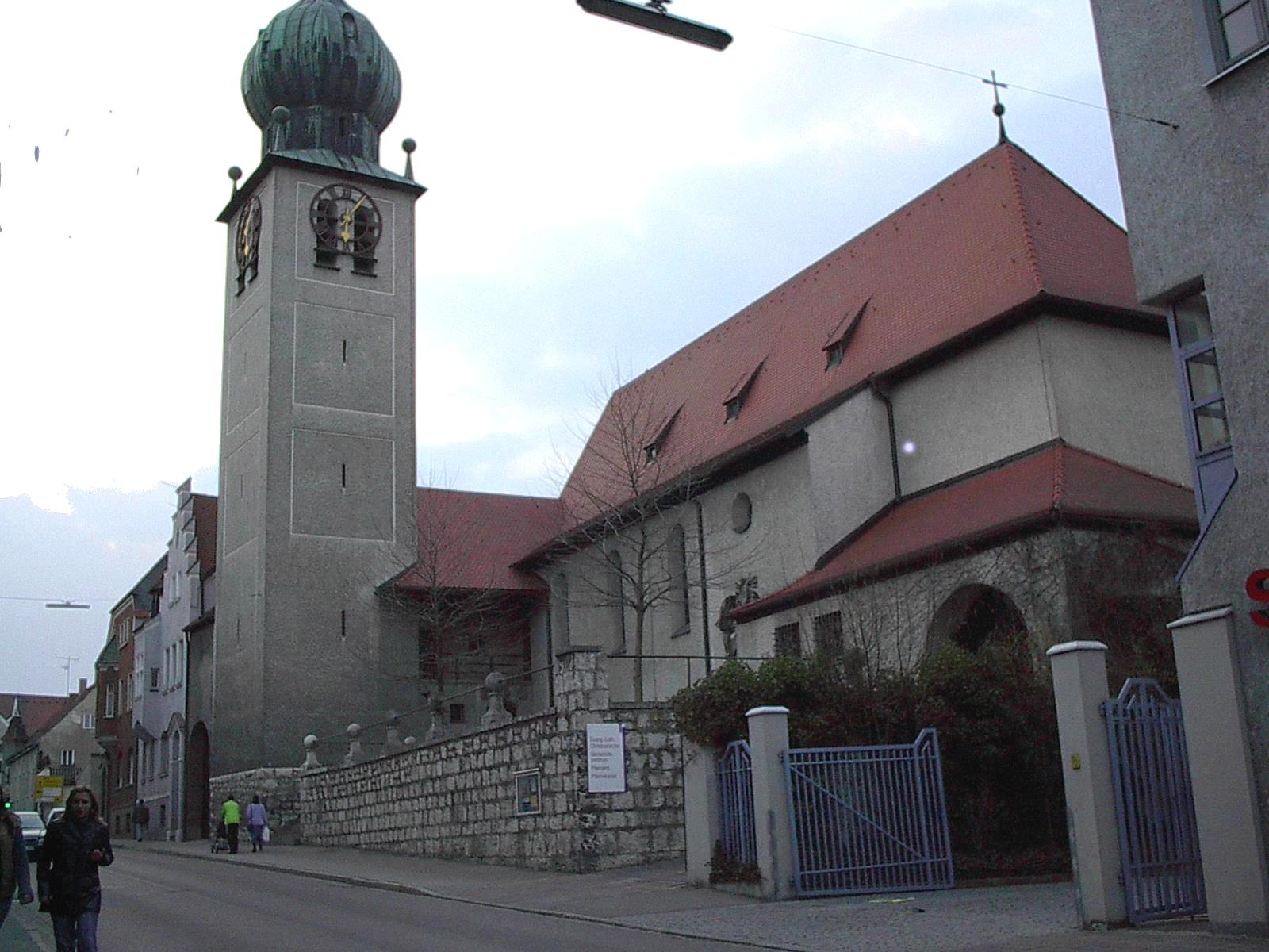 Die Christuskirche ein Wahrzeichen von Neuburg/Do.